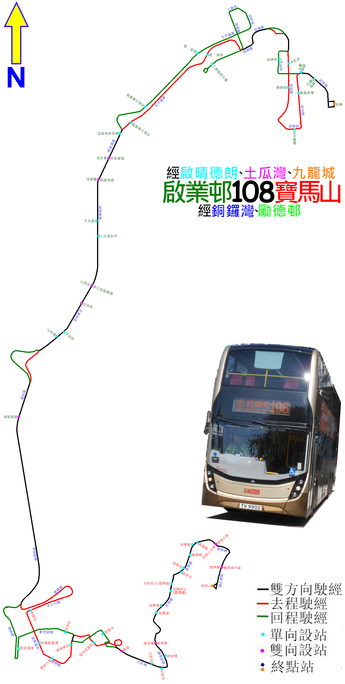 中文（香港）: 過海隧巴108線的走線圖